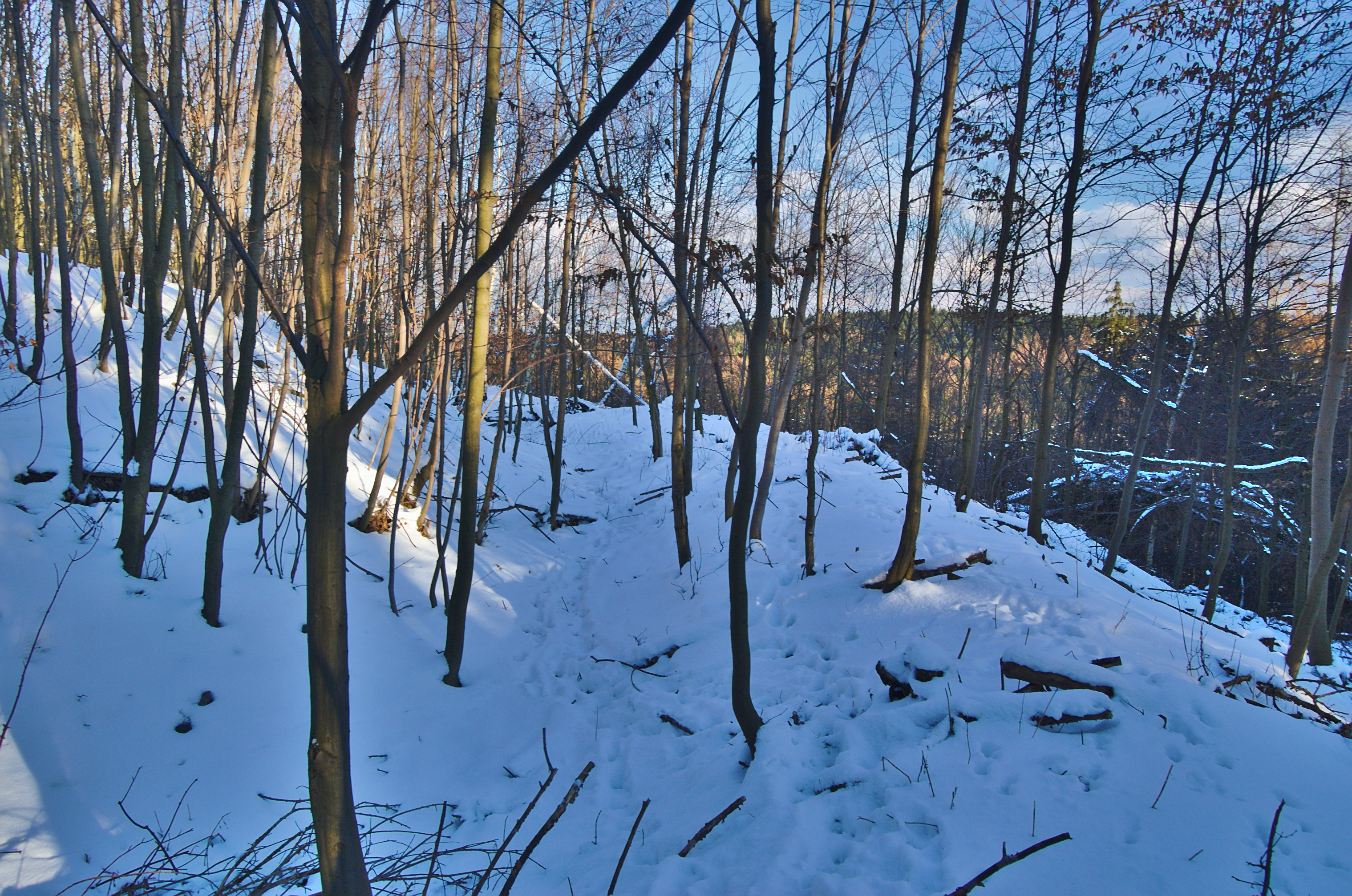 Příkop hradu Úsobrno, Úsobrno, okres Blansko